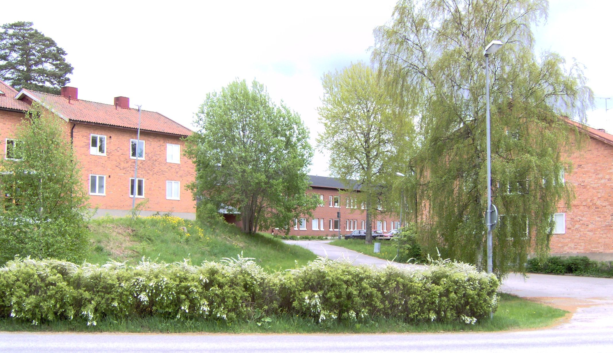 Logement på F18 numer studentbostäder på F 18, År 2006